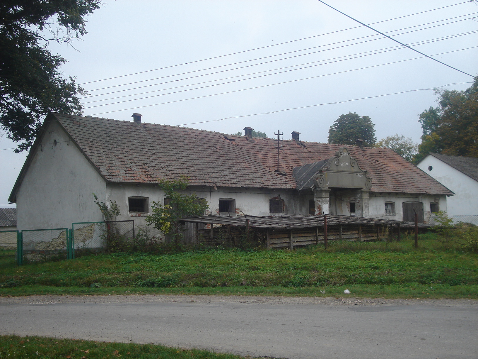 Mękarzów - zabudowania dworskie